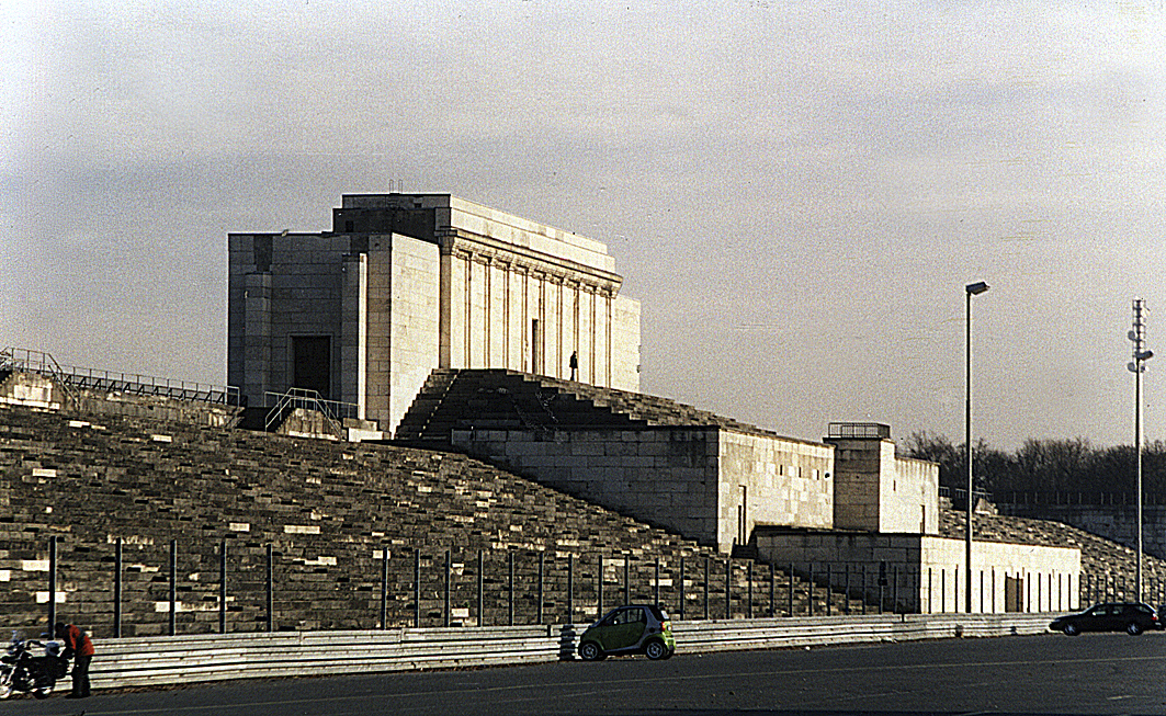 Цеппелинтрибуна